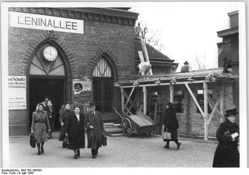 Bahnhof Leninallee wird erweitert. Am Bahnhof Leninallee in Berlin begannen die Arbeiten zur Erweiterung des Bahnhofes, um dem zu erwartenden Publikumdrang beim Deutschlandtreffen gerecht zu werden. UBz: Neue Schalterhäuser im Bau. Aufn.: Illus-Funk Pa. 6383-50 4.5.50.